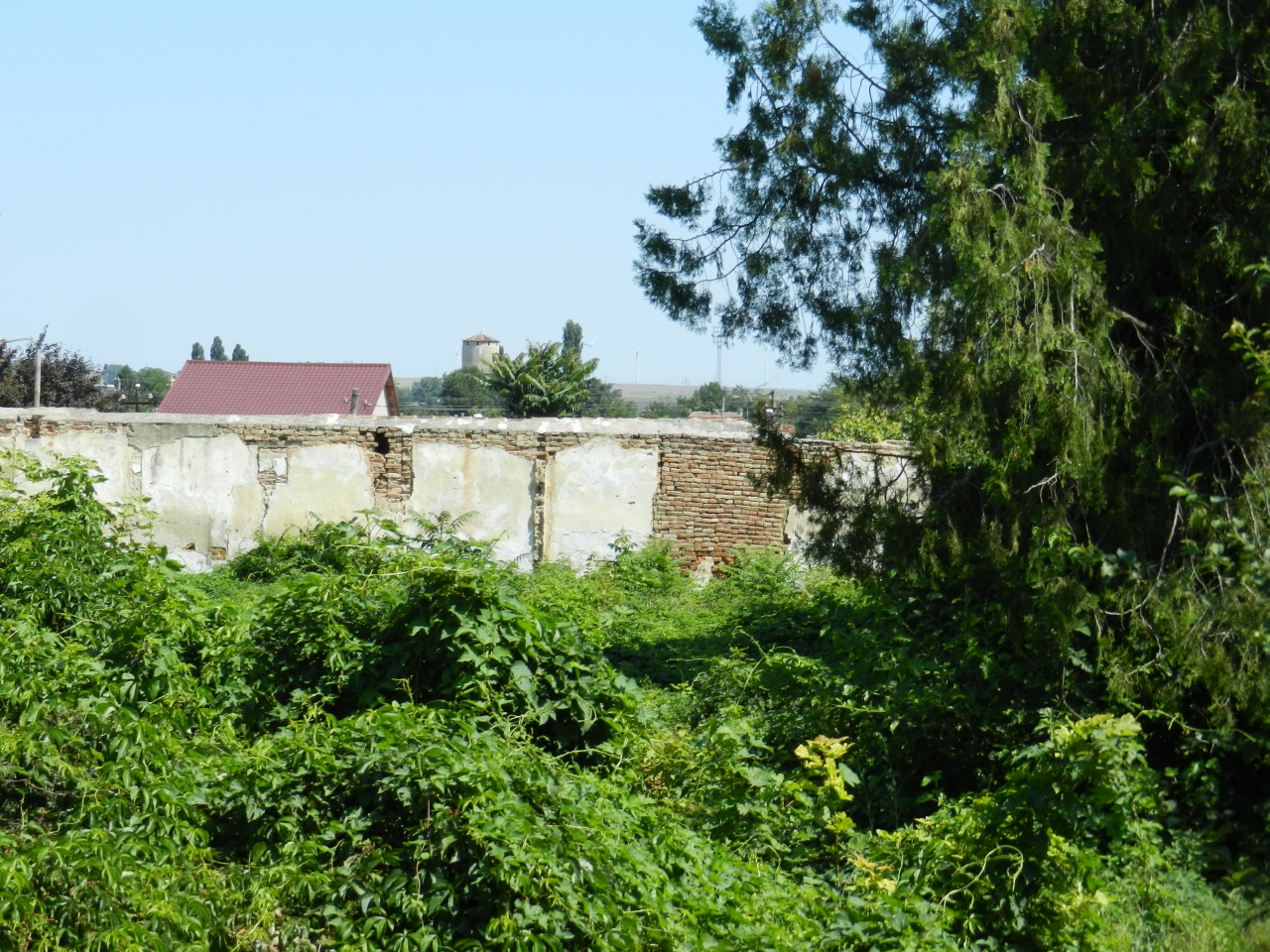 Seminar musulman construit in aceeasi perioada cu geamia si baia.